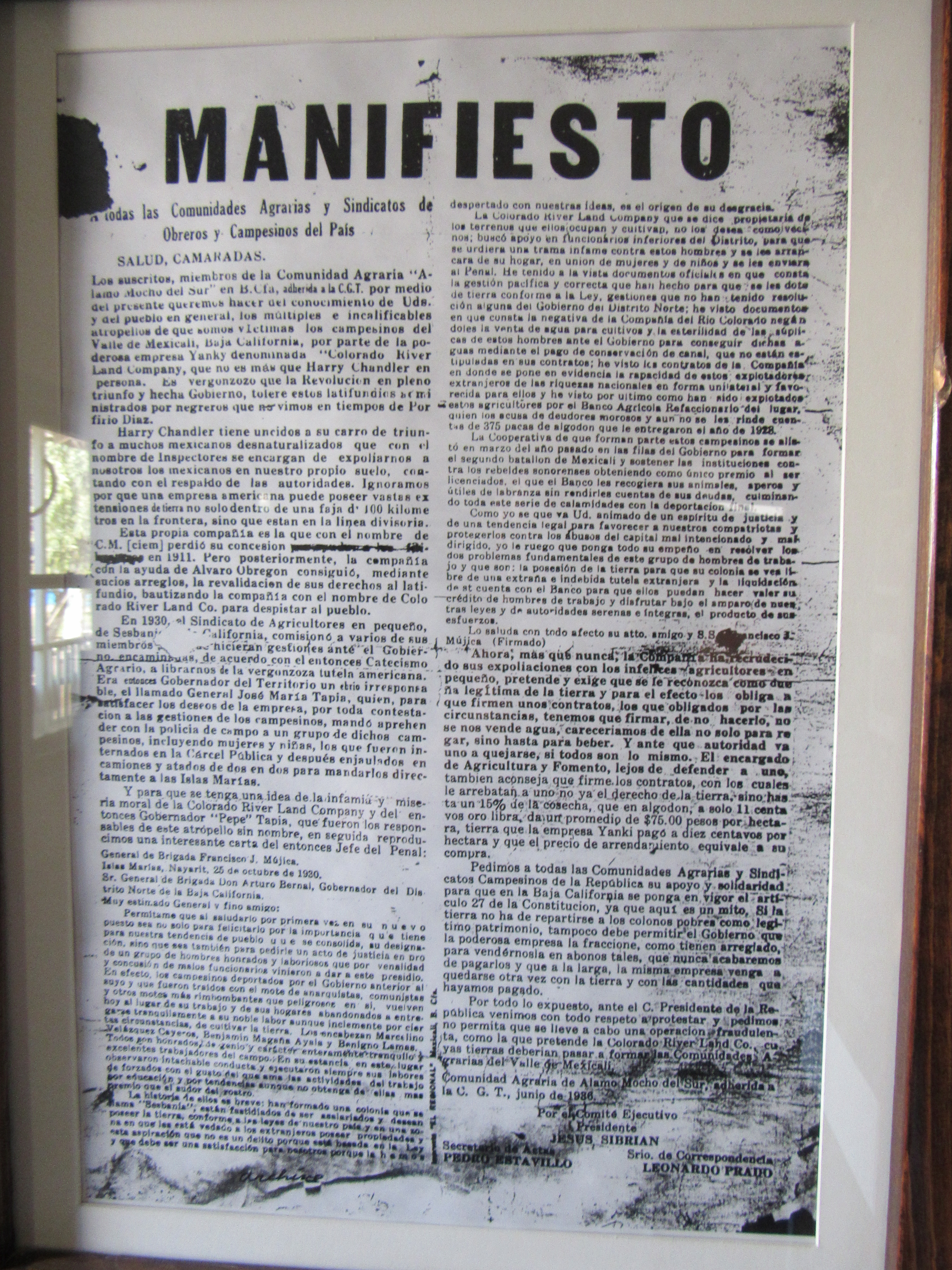 Este es una copia del manifiesto que el comité Álamo Mocho Sur publicó en 1936, que se encuentra en el museo Comunitario del Asalto a las Tierras y en el cual se denuncia los atropellos cometidos contra los campesinos del valle de Mexicali por parte de la "Colorado River Land Company".